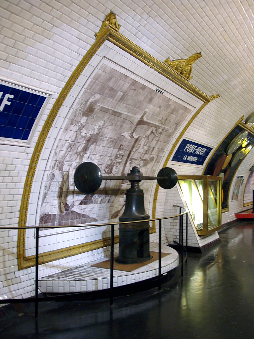 Station Pont Neuf de la ligne 7 du métro de Paris, France.